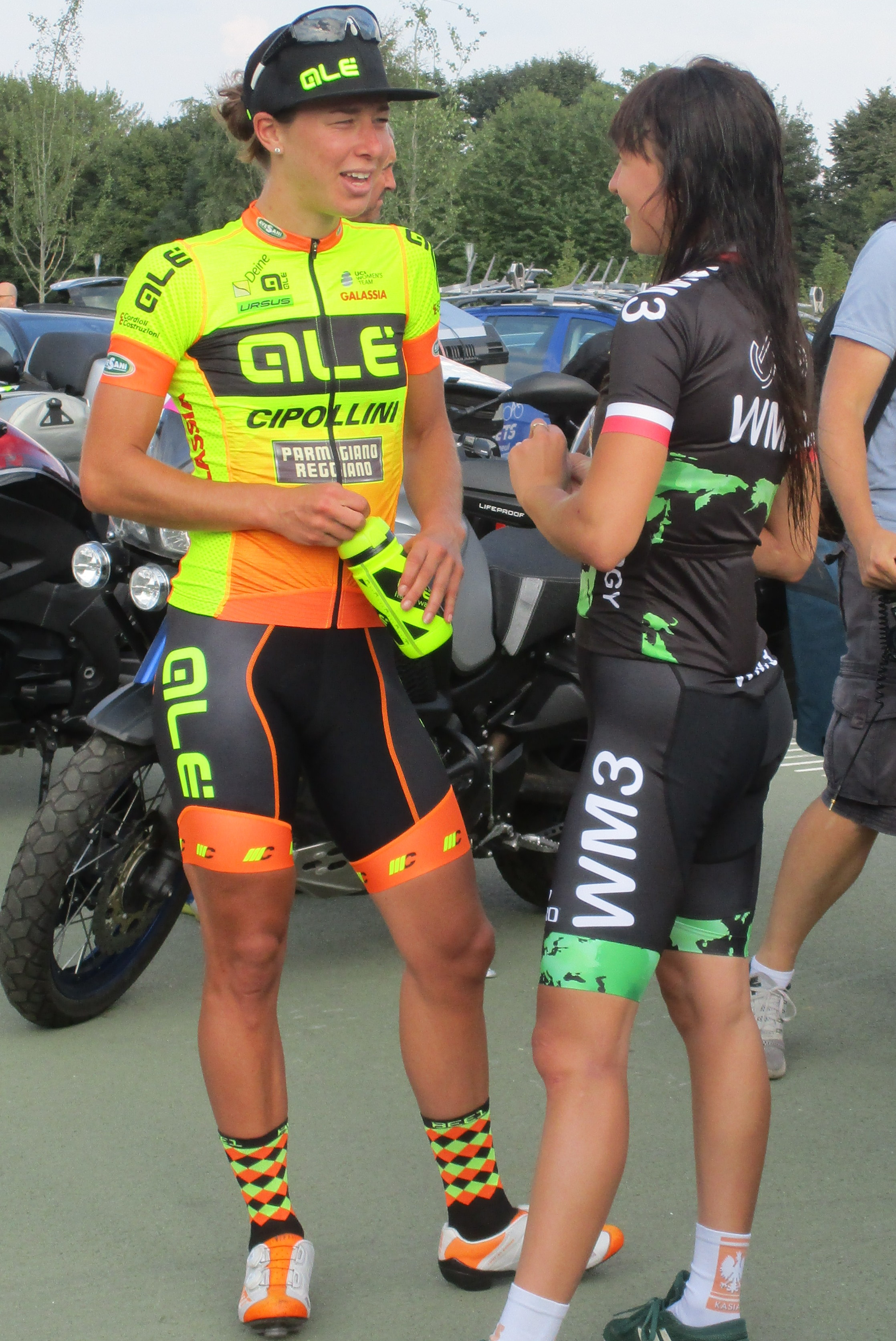 Na de finish van de laatste etappe van de Boels Ladies Tour 2017 op het Tom Dumoulin Bike Park in Sittard-Geleen.